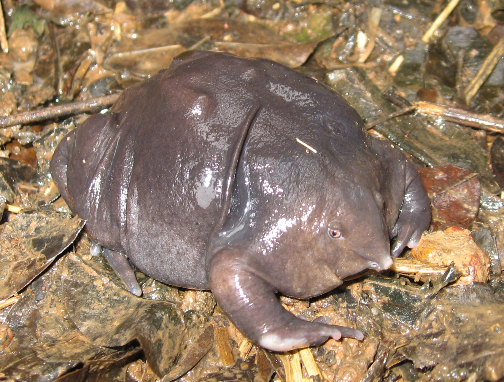 கேழல்மூக்கன்